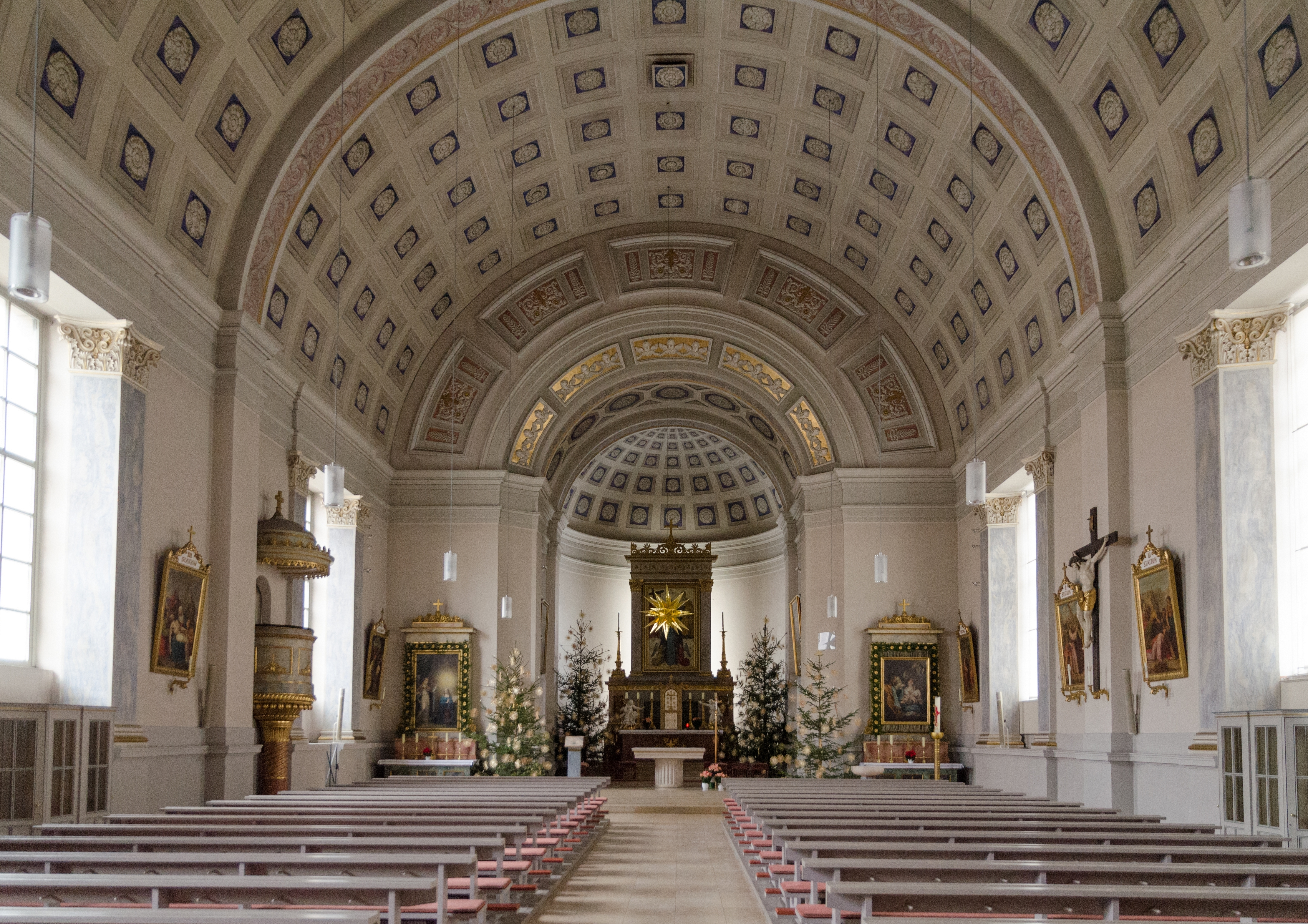 Ansbach, kath. Kirche St. Ludwig am Karlsplatz